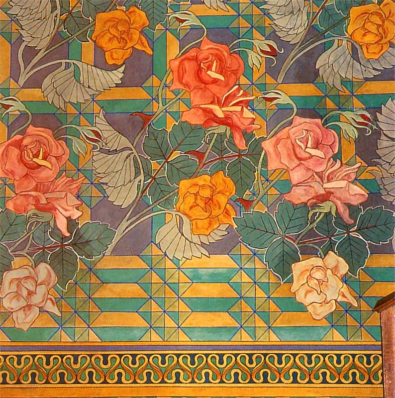 Stanisław Wyspiański